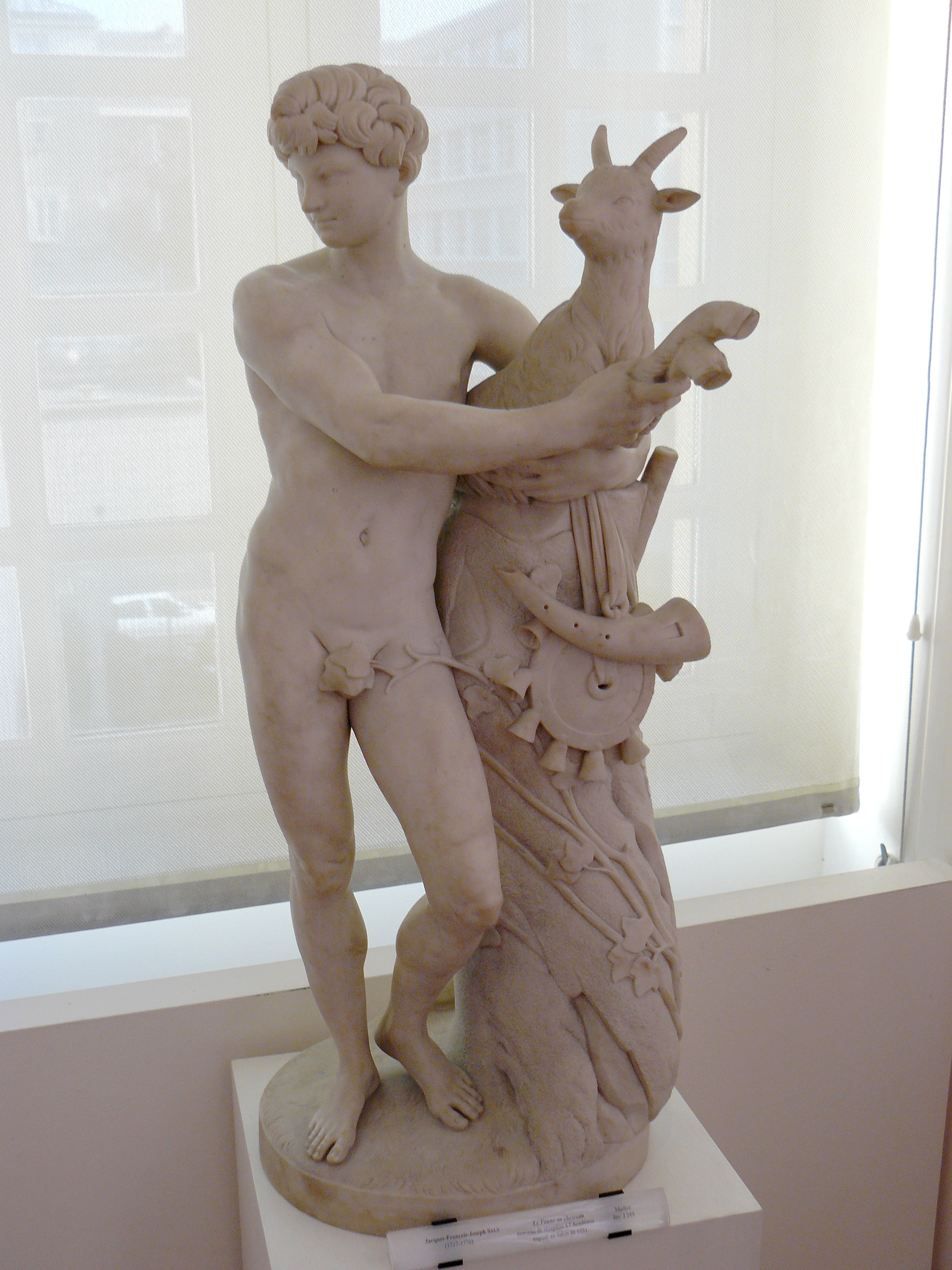 Jean-François Joseph Saly (1717-1776), Le Faune au chevreau, marbre, morceau de réception à l'Académie, exposé au Salon de 1751 (hauteur environ 1,30 m) - Musée Cognacq-Jay, inv. n°J249